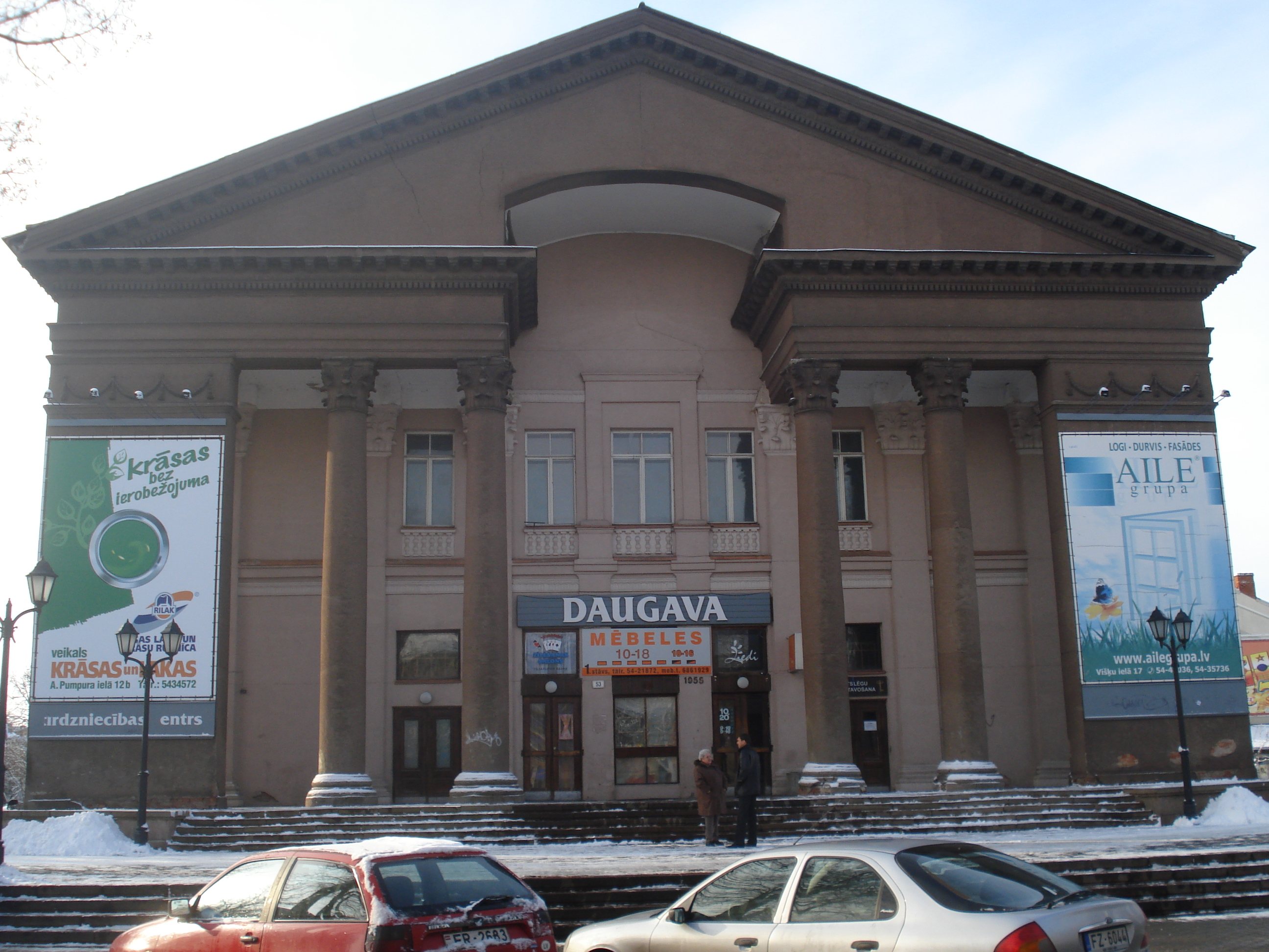 Former cinema "Daugava" in Daugavpils, Bijušais kinoteātris "Daugava" (Viestura ielā 53)